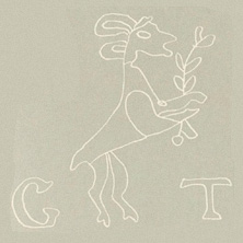 Філігрань Телекі на продукції папірні в Лисичеві